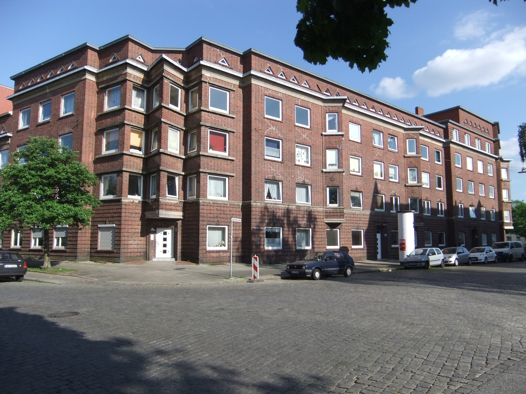 Spar- und Bauverein Lehe in Bremerhaven, Fritz-Reuter-Straße 42 . Die Gesamtanlage ist ein geschütztes Kulturdenkmal in der Freien Hansestadt Bremen, mit der Nr. 3069 beim Landesamt für Denkmalpflege registriert.